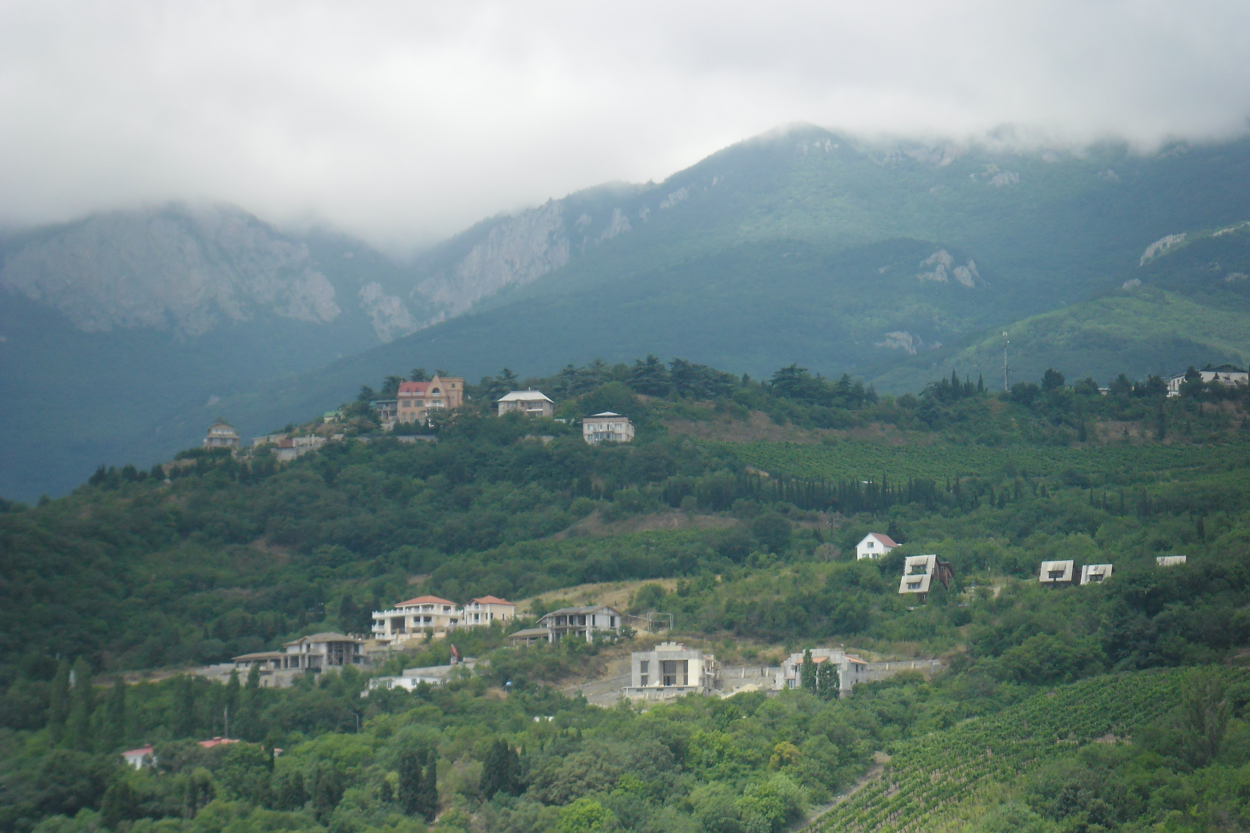 Фото